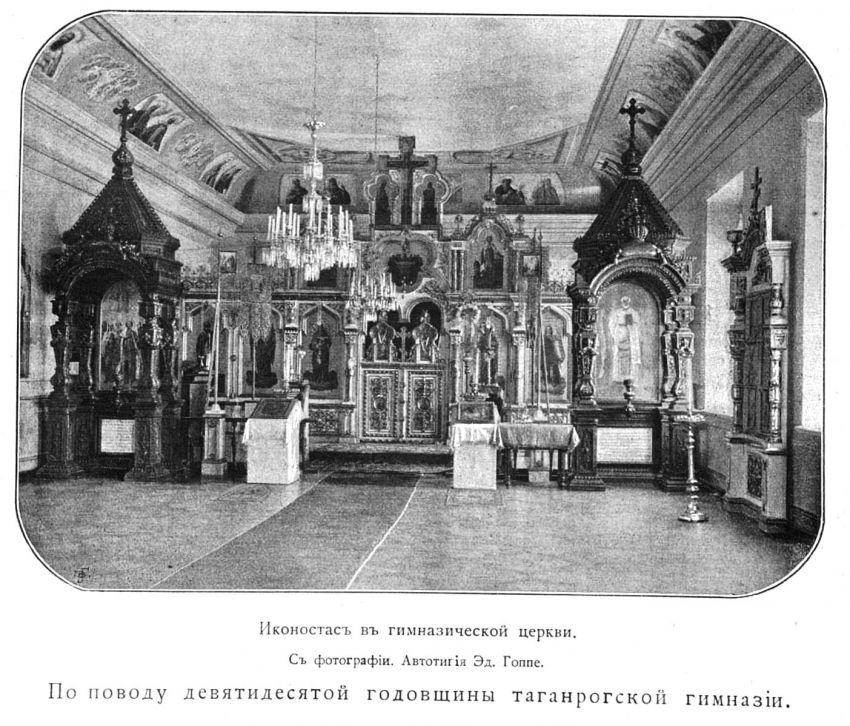 Таганрог, здание классической мужской гимназии с домовой церковью Рождества Пресвятой Богородицы (иконостас).